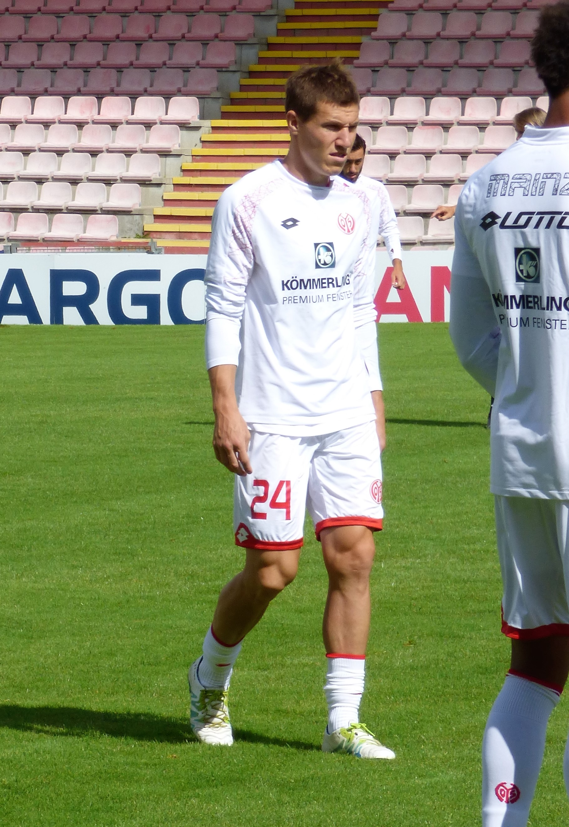 Gaëtan Bussmann, Mainz 05